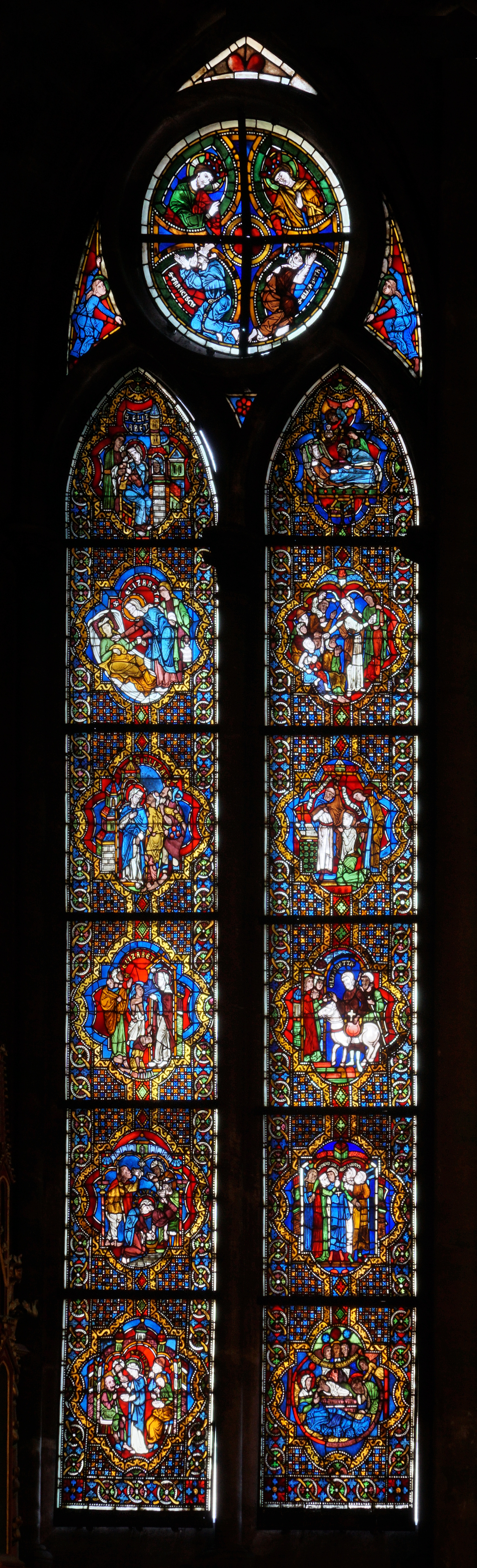 Rundfenster:* Krönung Franziskus u. ElisabethLinke Bahn:* Elisabeth besucht Gefangene* Elisabeth pflegt Kranke* Elisabeth beherbergt Fremde* Elisabeth kleidet Nackte* Elisabeth gibt zu Trinken und wäscht Füße* Elisabeth gibt zu EssenRechte Bahn* Elisabeth auf dem Totenbett* Elisabeth gibt Almosen* Elisabeth erhält von Konrad das „graue Gewand“* Elisabeth erfährt vom Tod Ludwig von Thüringen* Elisabeth nimmt Abschied von Ludwig* Geburt Jesu